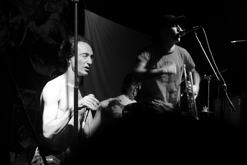 Las Manos de Filippi en Montevideo.